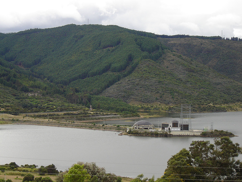 [Generalidades] El Proyecto San Rafael tiene como fin asegurar el suministro adecuado de agua a la ciudad de Bogotá D.C., y a los municipios integrados a la red matriz, más allá del año 2000, ya que provee al sistema de un embalse que permite almacenar agua para programar las inspecciones y mantenimiento de los túneles que conforman el Sistema Chingaza y garantizar el suministro de agua ante posibles emergencias que se puedan presentar. El proyecto consta de una presa, un túnel de desviación, un dique auxiliar, una galería de drenaje y otra de acceso a la cámara de válvulas, estructuras de captación, de control y descarga de fondo, un rebosadero de emergencia, una galería de captación y una estación de bombeo hacia la Planta Francisco Wiesner con su respectiva tubería de impulsión.